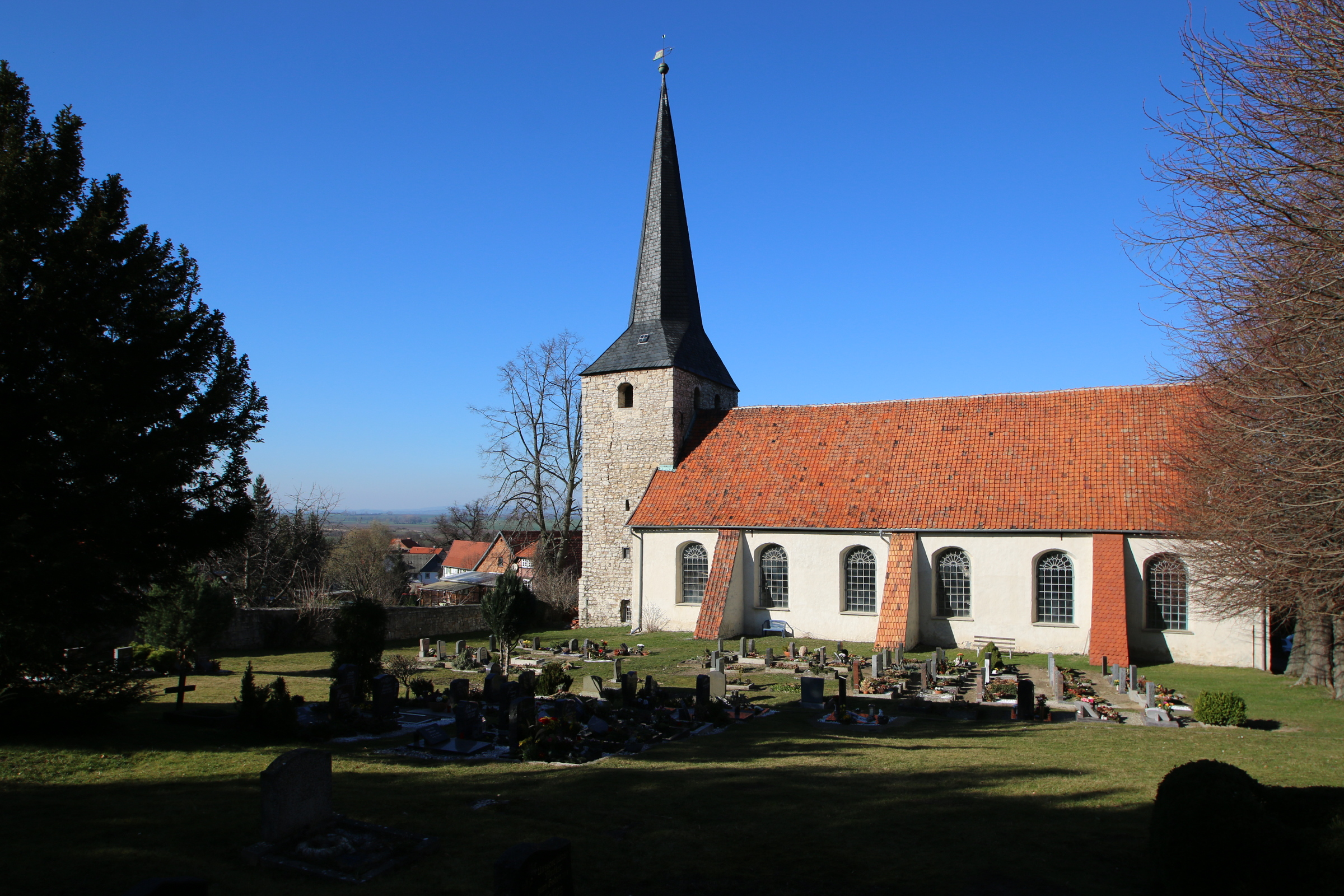 Dorfkirche in Dingelstedt / Huy